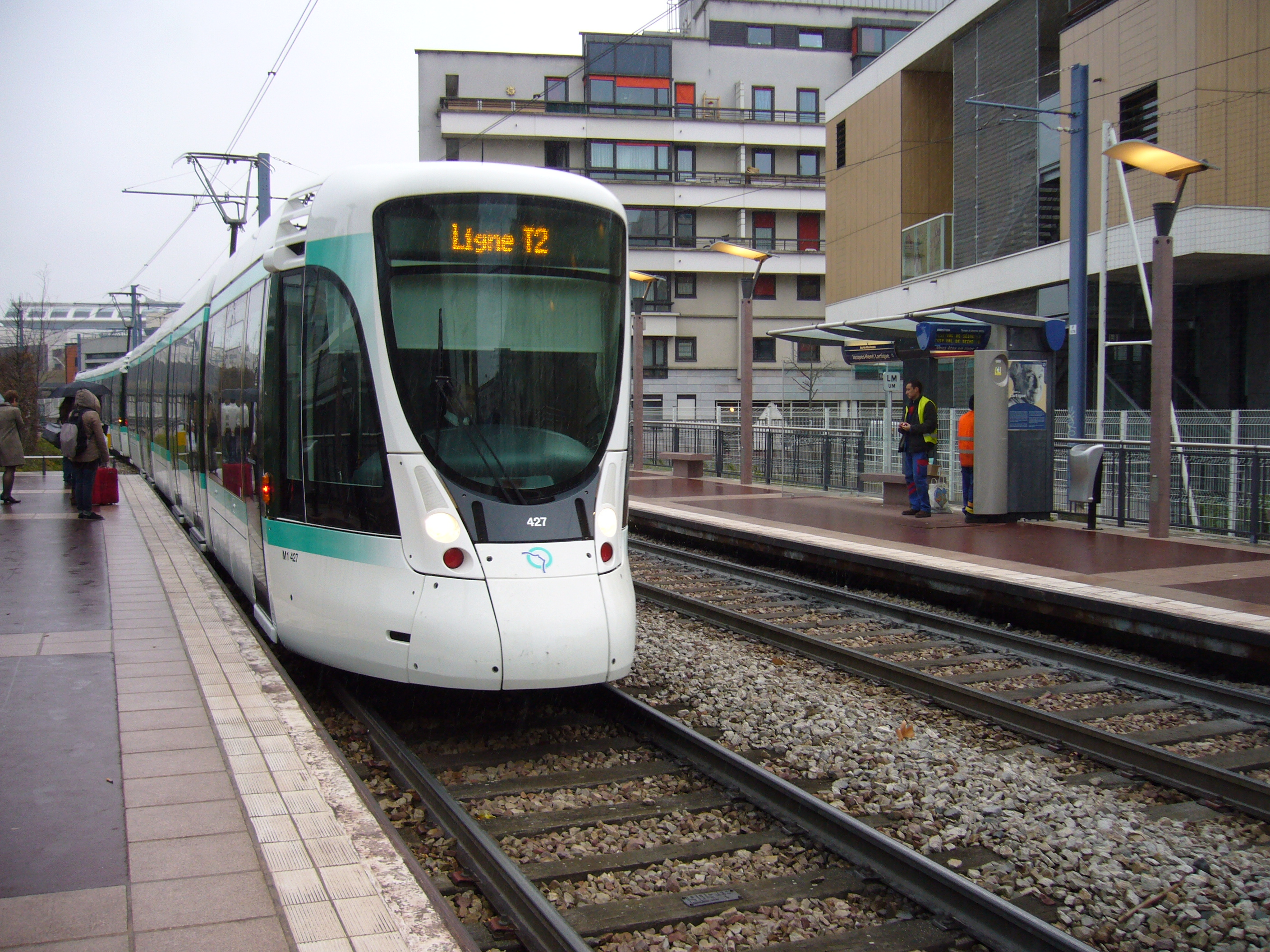 Nouveau nez des Citadis 302 sur la ligne 2 du tramway d'Île de France.